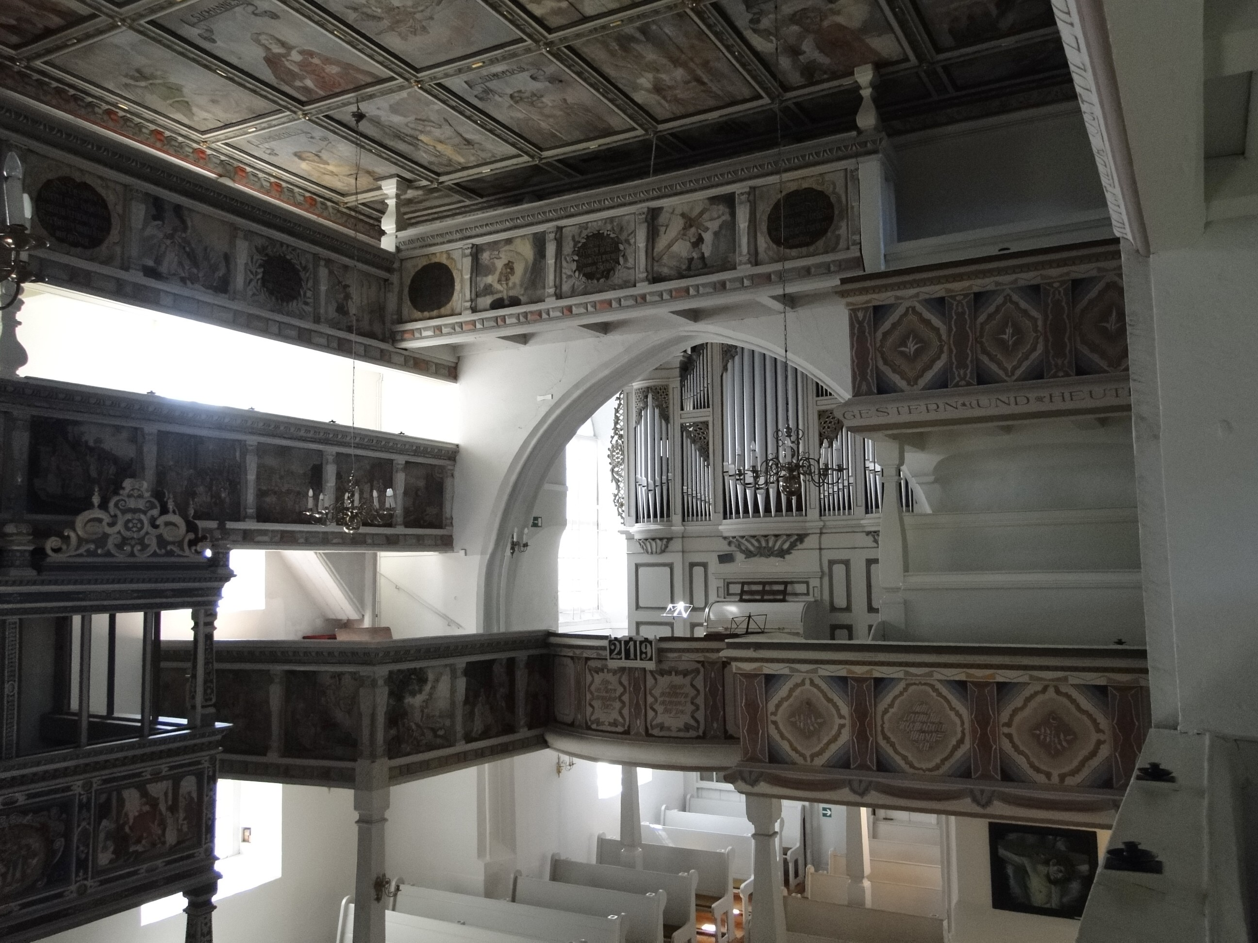 Emporen Kirche Leubnitz-Neuostra